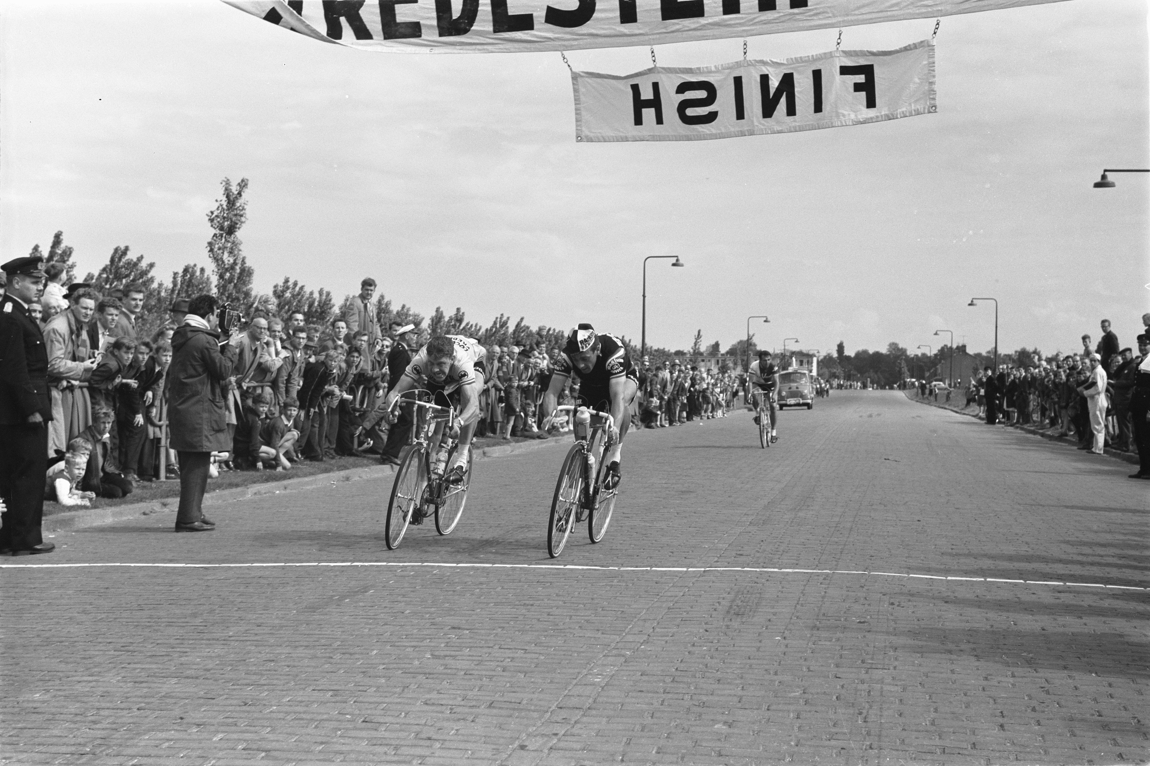 Collectie / Archief : Fotocollectie Anefo Reportage / Serie : Ronde van Nederland 1961 Beschrijving : Ronde van Nederland in Utrecht begonnen. Finish Amsterdam. Jac. van der Klundert en Hubert Zilverberg Datum : 16 mei 1961 Locatie : Amsterdam, Noord-Holland Trefwoorden : finishen, ronden, wielrennen Persoonsnaam : Klundert, Jac. van der, Zilverberg, Huub Fotograaf : Fotograaf Onbekend / Anefo Auteursrechthebbende : Nationaal Archief Materiaalsoort : Negatief (zwart/wit) Nummer archiefinventaris : bekijk toegang 2.24.01.05 Bestanddeelnummer : 912-4834